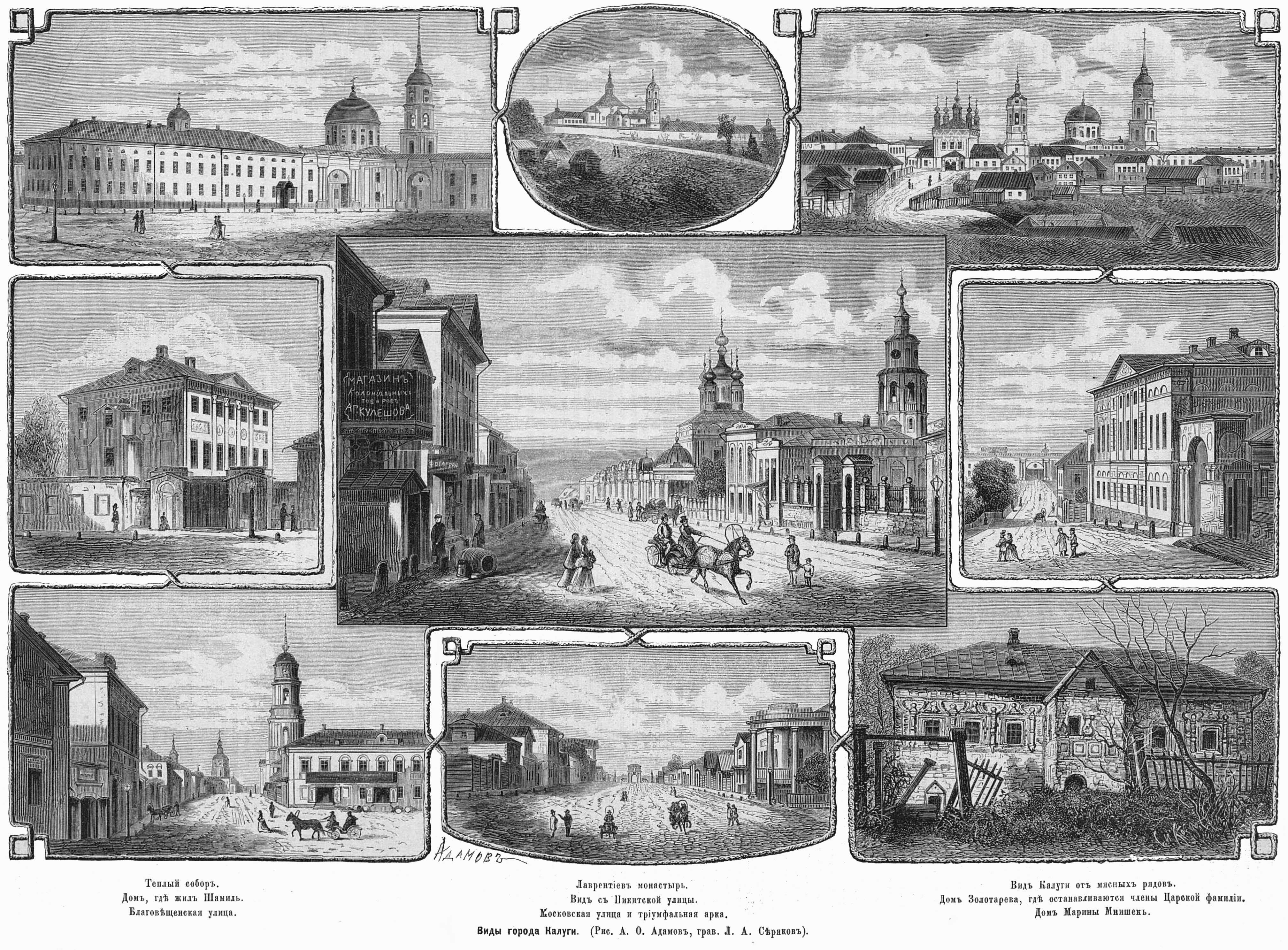 Виды Калуги, 1874 год